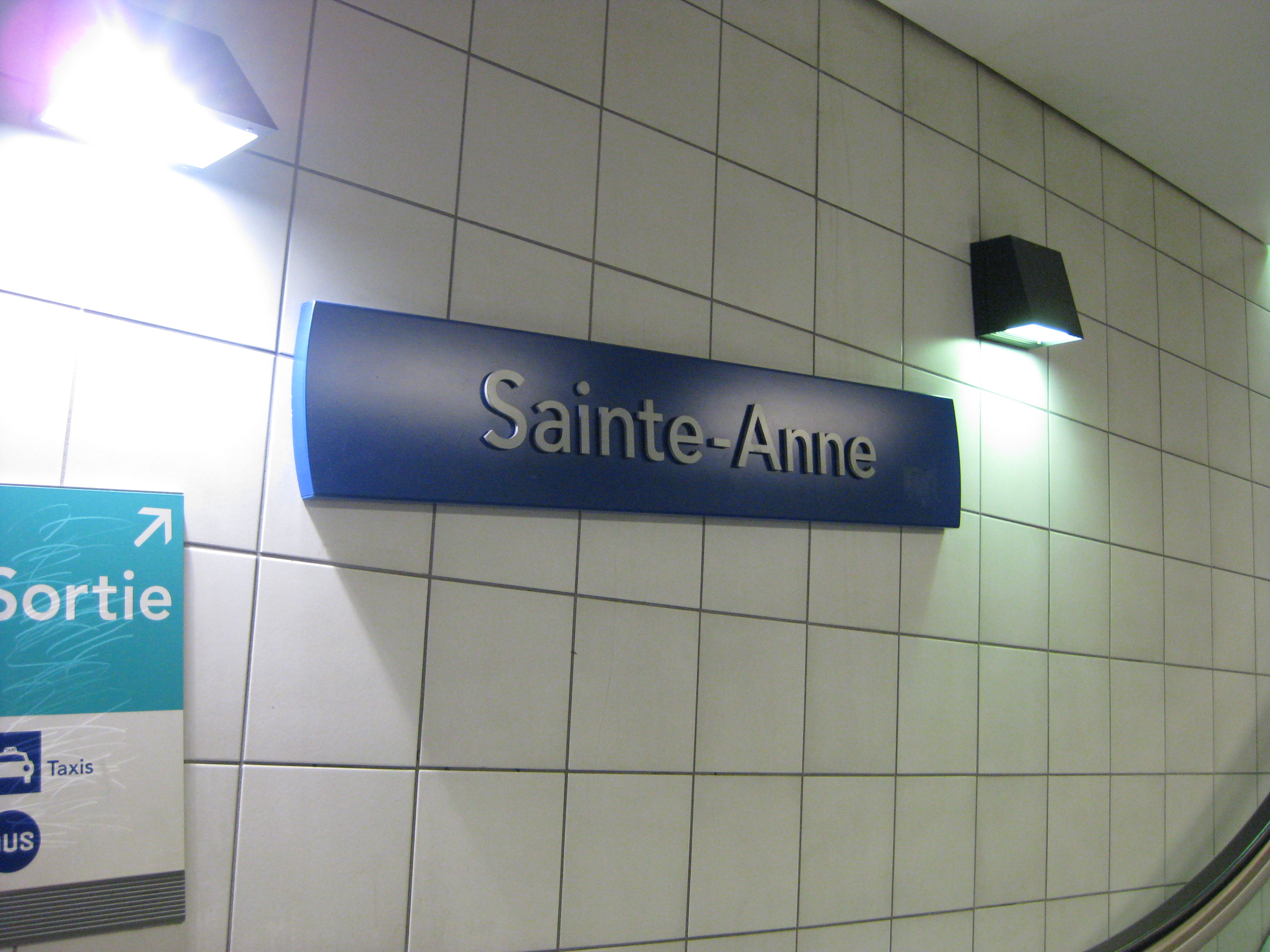 Panneau de la station de métro Sainte-Anne à Rennes